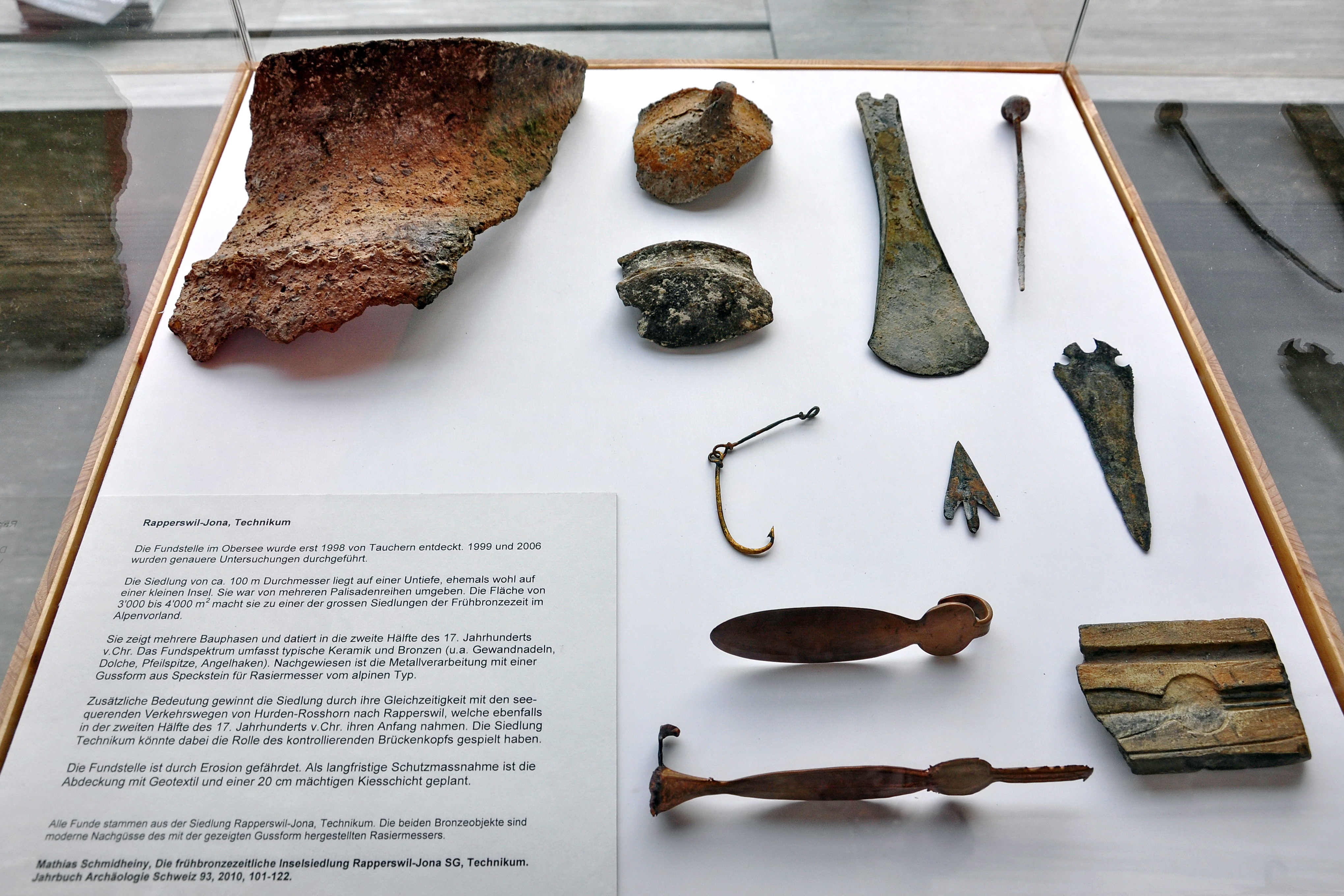 Fundstelle der Inselsiedlung (17. Jahrhundert v.Chr.) im Obersee im Bereich Technikum–Holzbrücke in Rapperswil (Switzerland) : Das Fundspektrum umfasst u.a. Keramik und Gewandnadeln, Dolche, Pfeilspitzen und Angelhaken aus Bronze sowie eine Gussform aus Speckstein für Rasiermesser vom alpinen Typ. Einige Bronzeobjekte sind Nachgüsse aus der bei der Siedlung geborgenen Gussform.